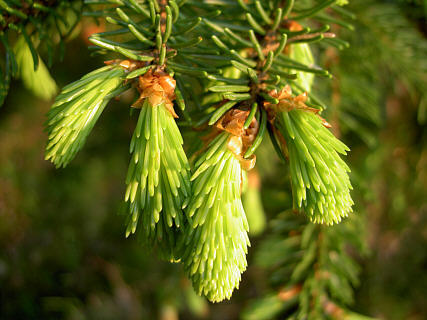 Fichtentriebe